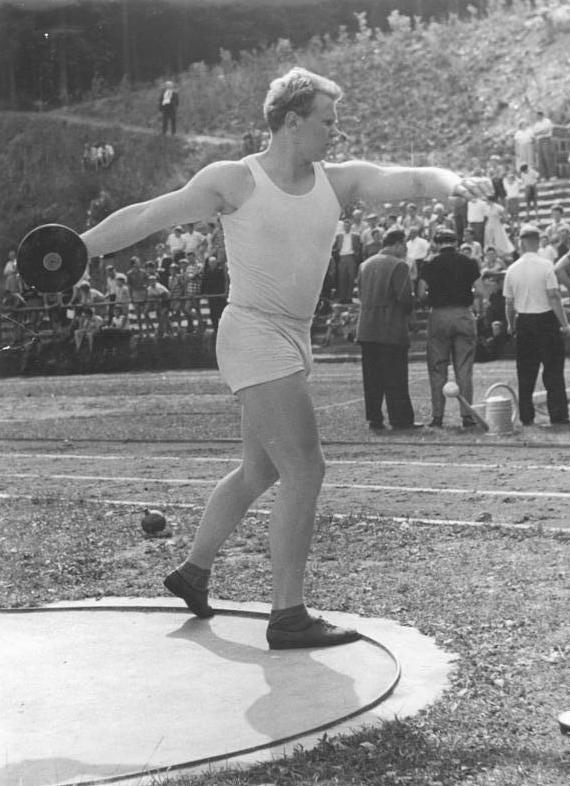 Manfred Grieser Zentralbild Gahlbeck 16.07.1958 Leichtathletik-Sportfest in Steinach. Am 13.07.1958 veranstaltete die BSG Motor Steinach mit Spitzensportlern des SC DHfK Leipzig im Steinacher-Stadion ein Leichtathletik-Sportfest. UBz: Sieger im Diskuswerfen wurde der Meister des Sports, Manfred Grieser.